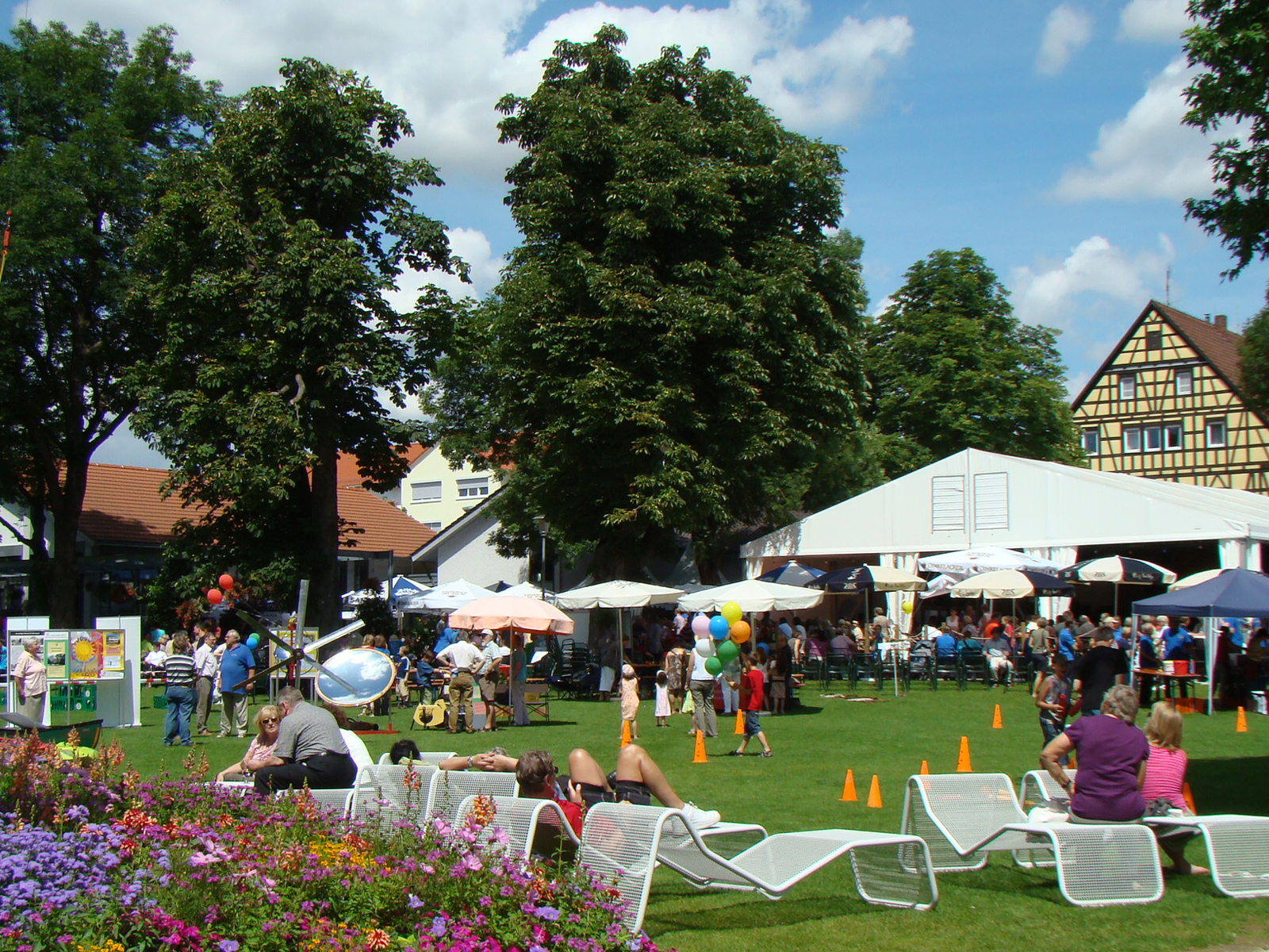 Blumensommer in Nordheim (Württ.) 2009